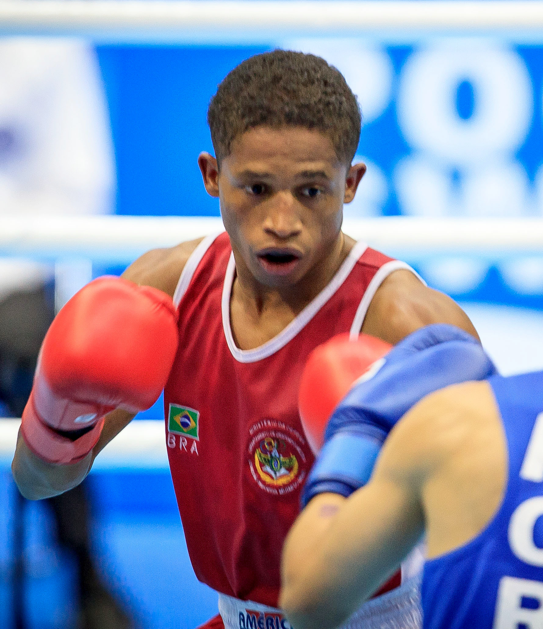 Santos Carvalho é prata no Boxe Yeongju nos 6º Jogos Mundiais Militares. Foto: Sgt Johnson Barros